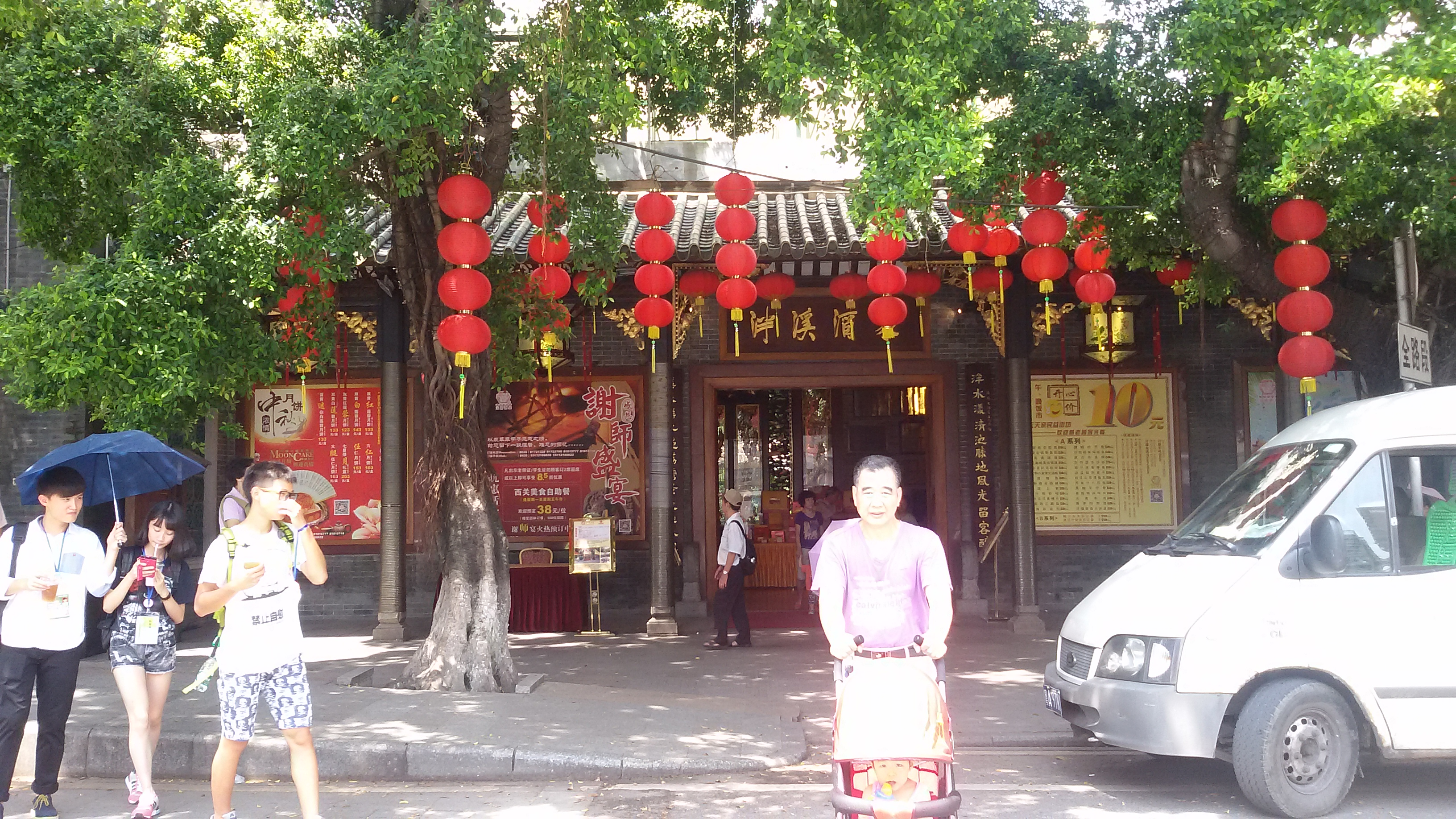 粵語: 泮溪酒家